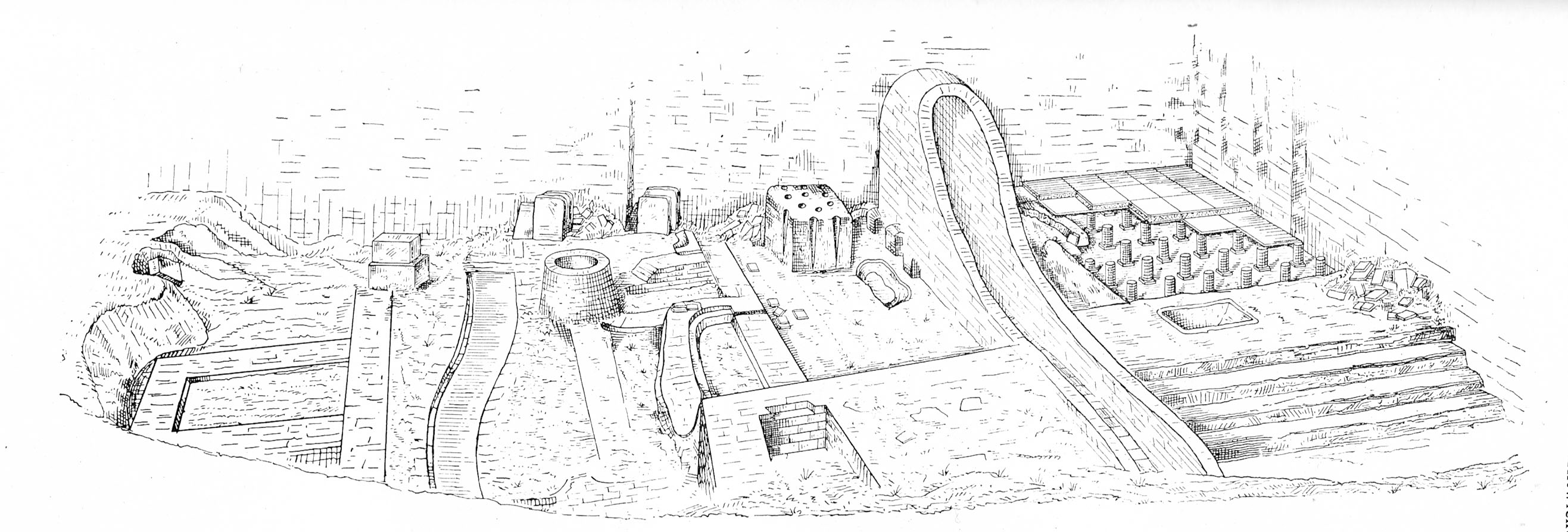 Skizze von LERSCH der Ende des 19. Jahrhunderts ausgegrabenen römischen Büchelthermen.